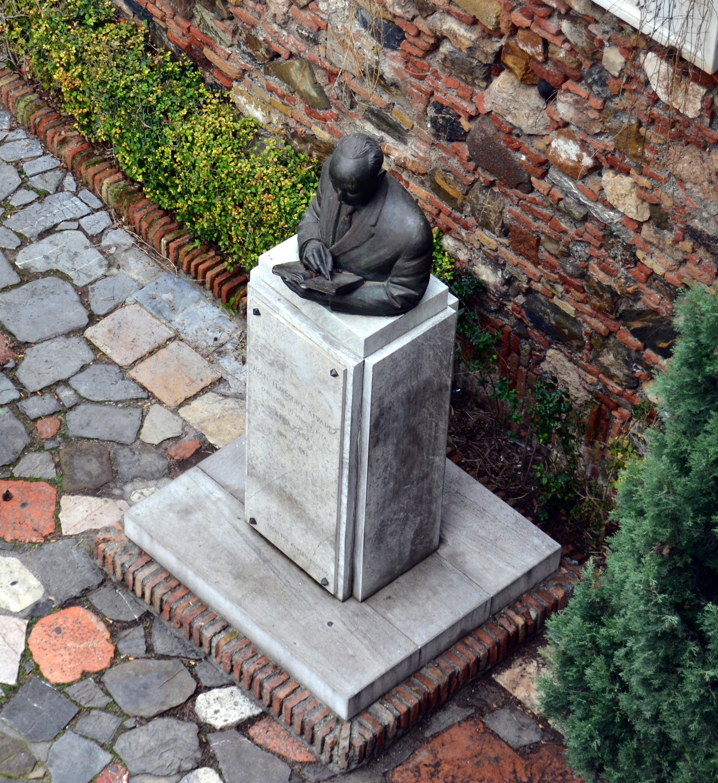 Monumento a Juan Temboury, Málaga, España.